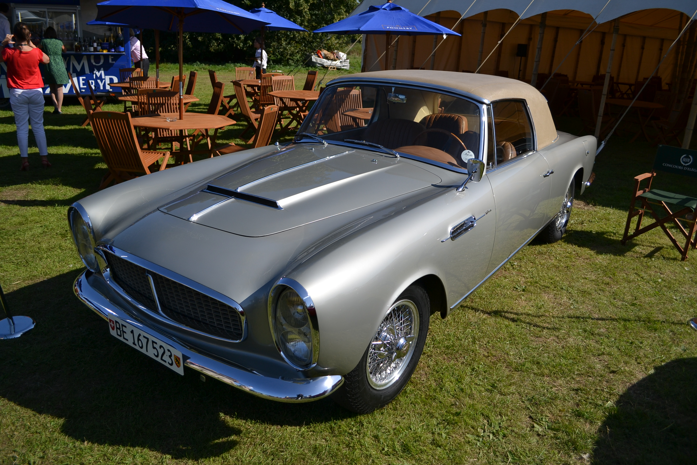 Salon Privé London 2012 Graber TE 21 Series II cabriolet